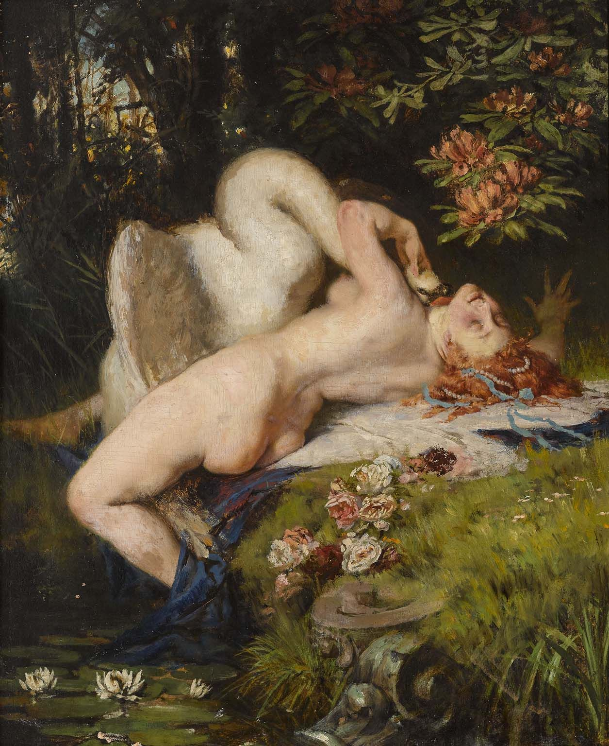 Leda und der Schwan Rückseitig bezeichnet sowie Inventaretikett und -stempel. Öl auf Holz. 55 × 43 cm. Einschubleisten. Rest. Rahmen min. besch. Echtheitsbestätigung durch Dr. Hans Konrad Röthel, Direktor der Städtischen Galerie im Lenbachhaus, vom 5. 10. 1962 (in Fotokopie). Provenienz: ehemals Städtische Kunstsammlungen der Stadt München, Inventar-Nr. G 10604. € 8.000–9.000